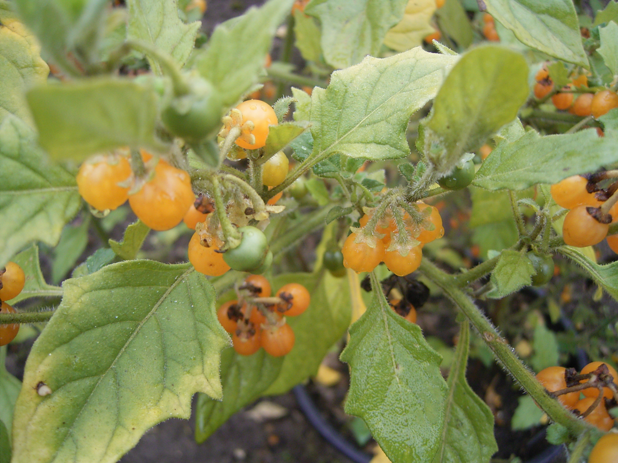 Deze foto toont de vruchten en de bladeren van de Donsnachtschade. Ik nam de foto op 1 oktober 2005 in arboretum De Dreijen in Wageningen. This photo shows the fruits and the leaves of Solanum villosum. I took the photo in arboretum De Dreijen.